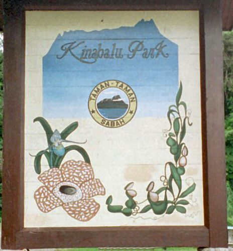 Sign "Kinabalu Park" Borneo - Malaysia Juli 1998